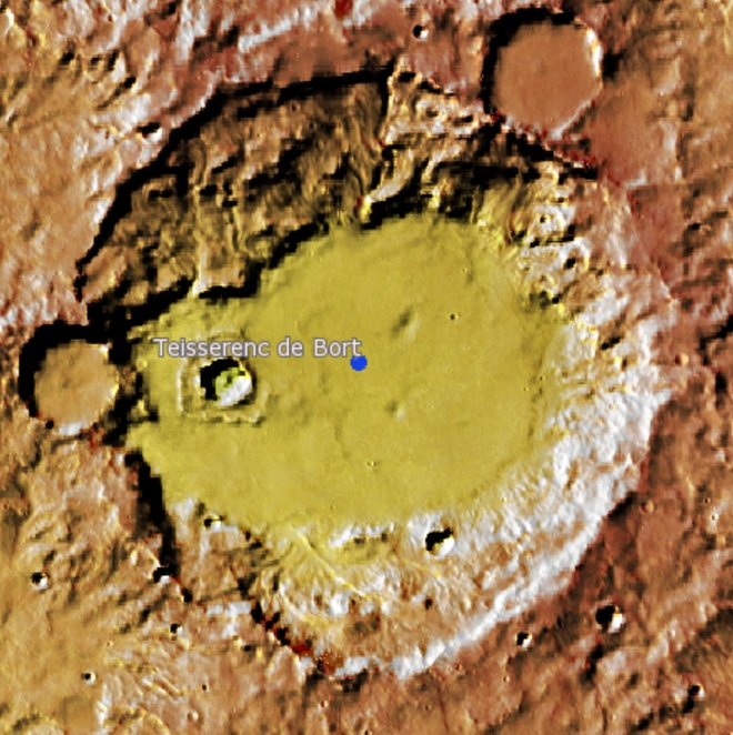 Cráter marciano Teisserenc de Bort. (Imagen IAU/USGS/Goddard/A SU/USGS)